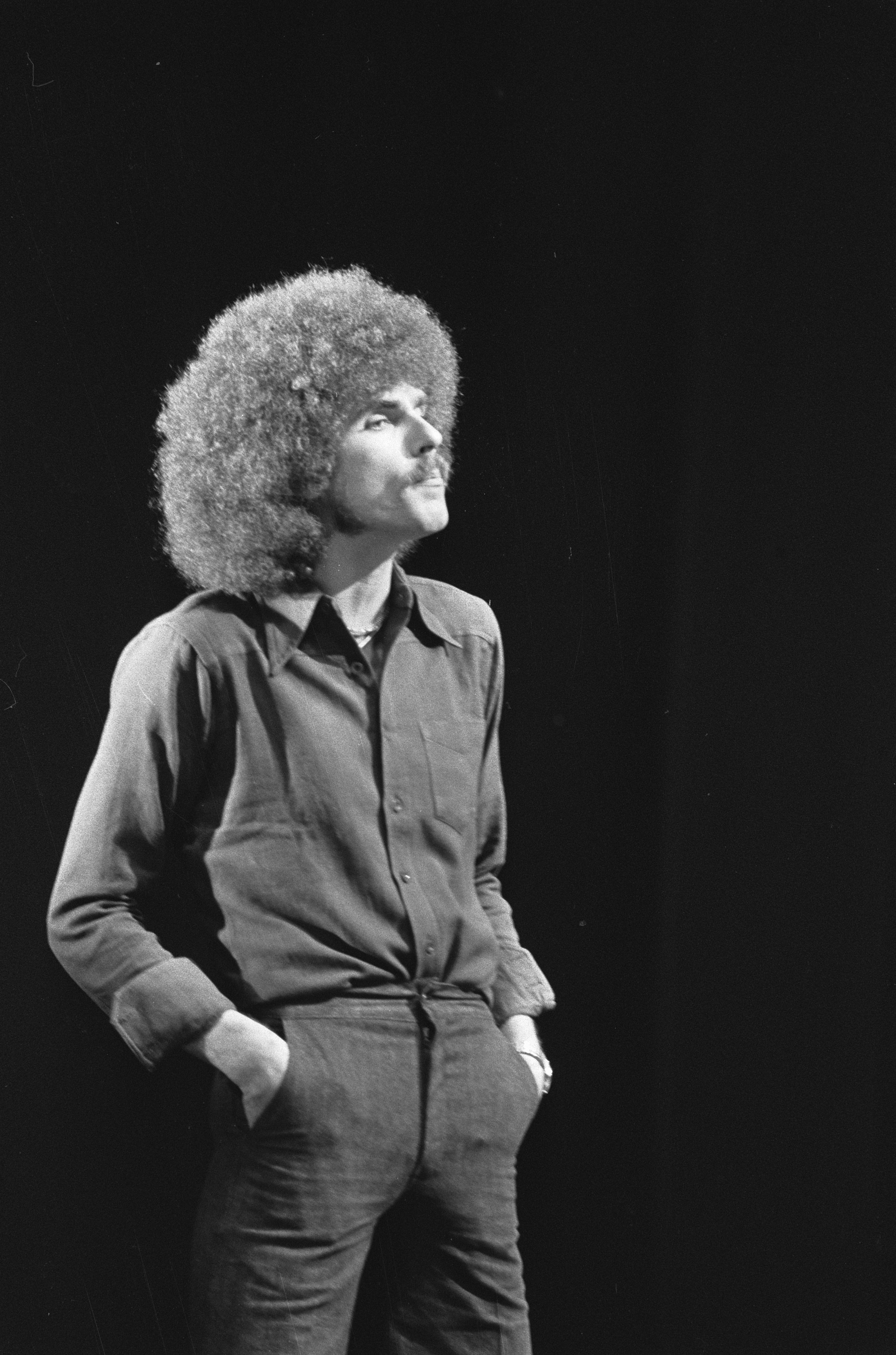 Collectie / Archief : Fotocollectie Anefo Reportage / Serie : [ onbekend ] Beschrijving : Opname show van Robert Long (VARA), Robert Long tijdens opnames Datum : 10 september 1974 Trefwoorden : shows Persoonsnaam : Long, Robert Instellingsnaam : VARA Fotograaf : Peters, Hans / Anefo Auteursrechthebbende : Nationaal Archief Materiaalsoort : Negatief (zwart/wit) Nummer archiefinventaris : bekijk toegang 2.24.01.05 Bestanddeelnummer : 927-4432